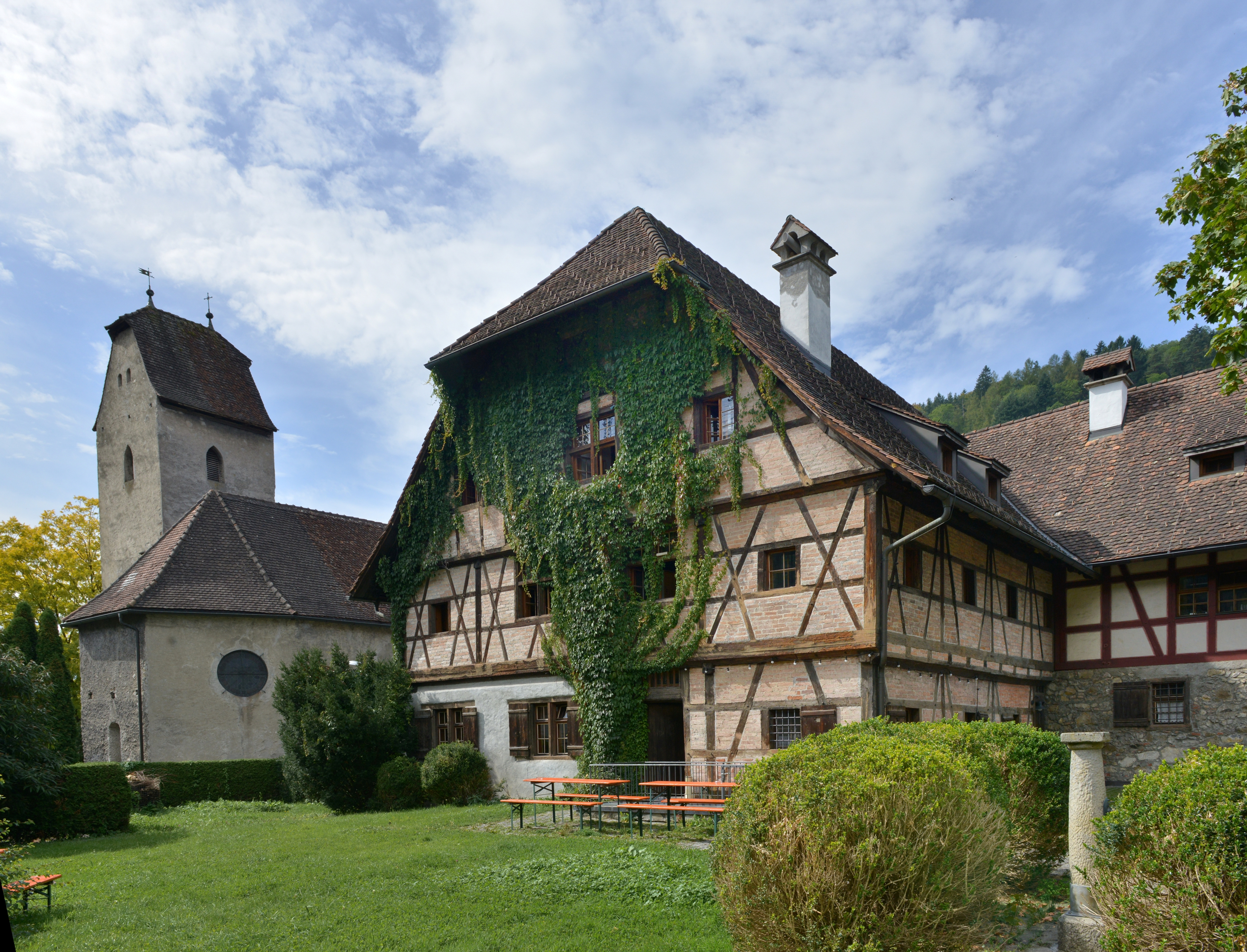 Feldkirch, Levis Reichsstraße Nr.111 ehemaliges Siechenhaus (Hofseite), heute Jugendherberge. Links im Bild die Kath. Pfarrkirche hl. Magdalena. Kath. Pfarrkirche hl. Magdalena